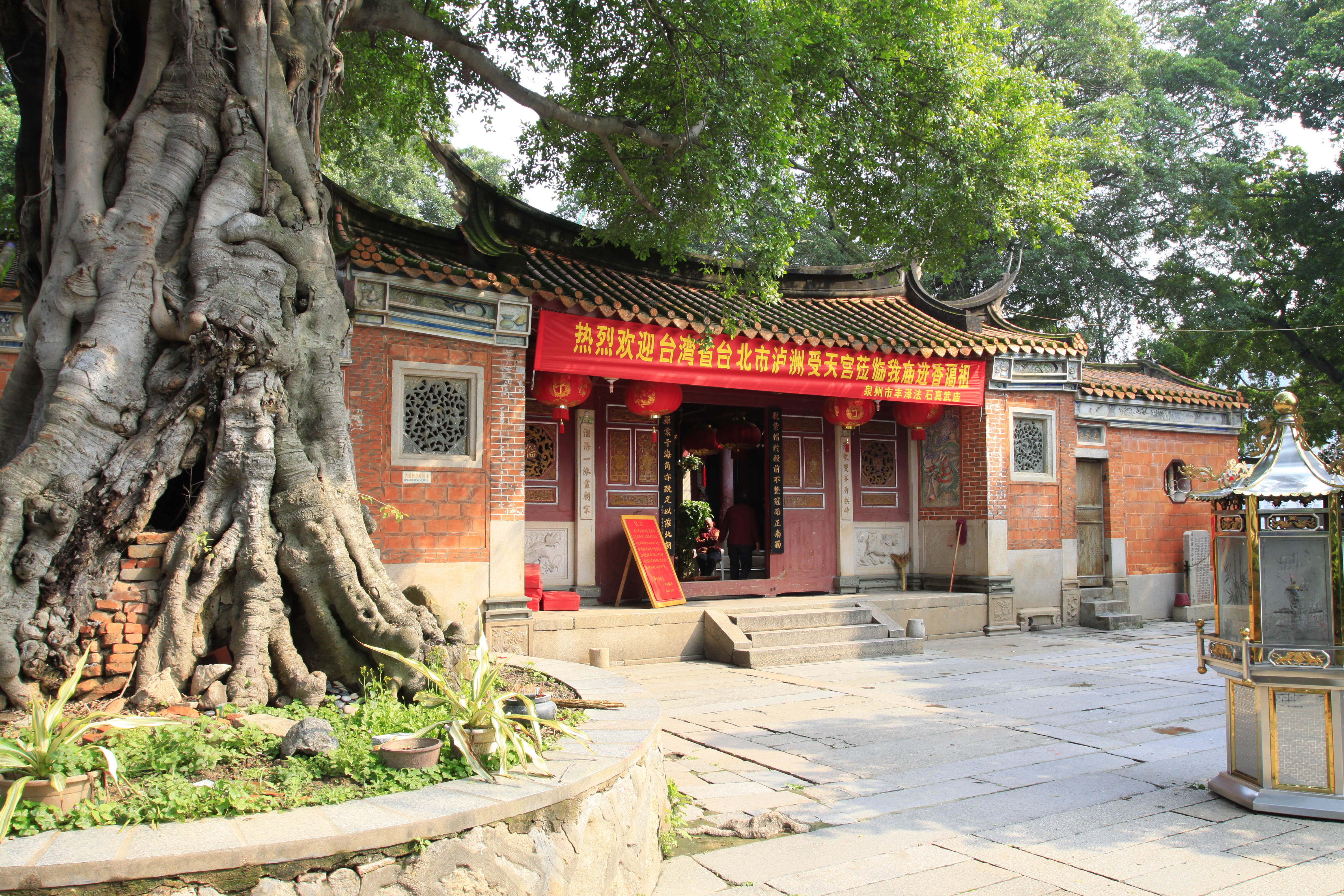 法石真武庙，位于中国福建省泉州市，是全国重点文物保护单位。